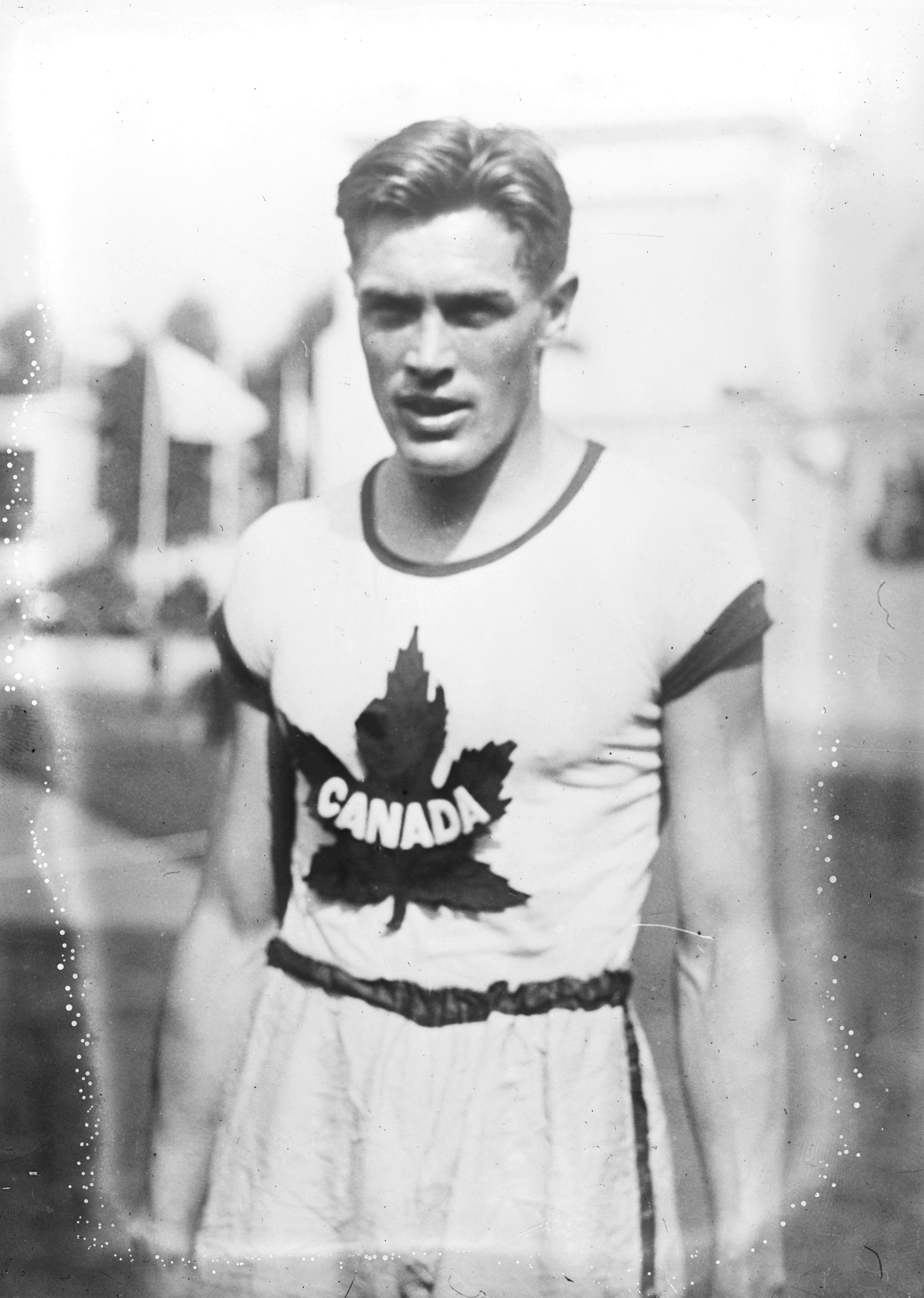 Tommy Thomson, gagnant du 110 m haies [des Jeux olympiques d'Anvers].